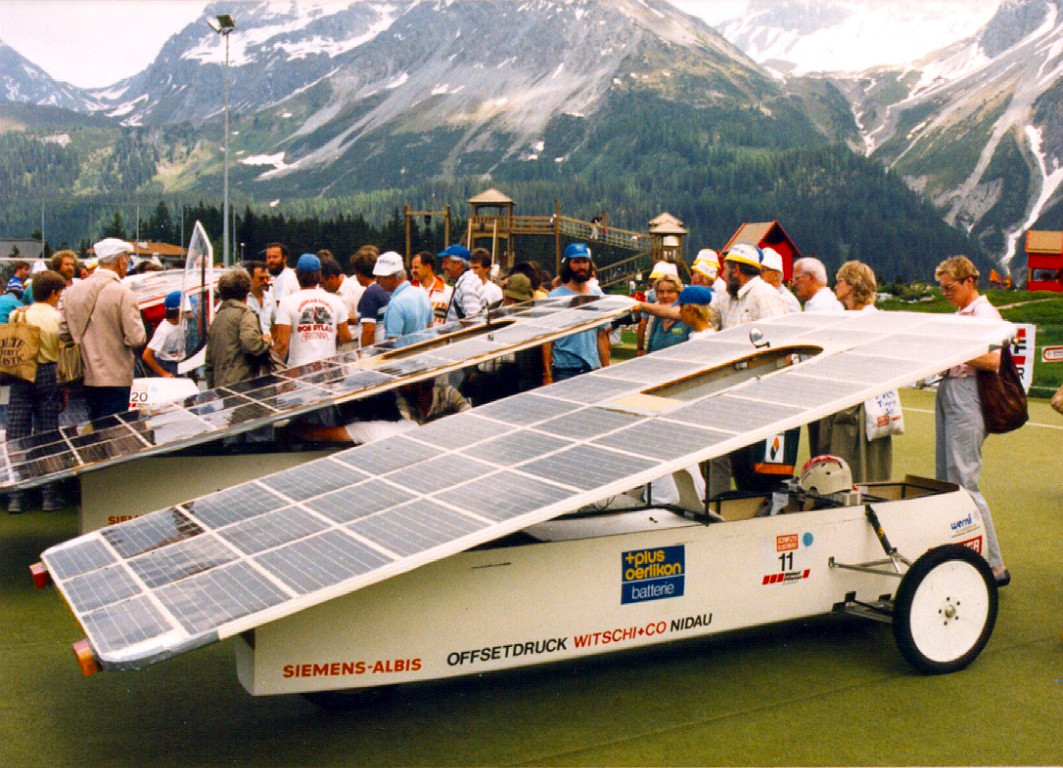 Solarfahrzeug Tour de Sol 1987